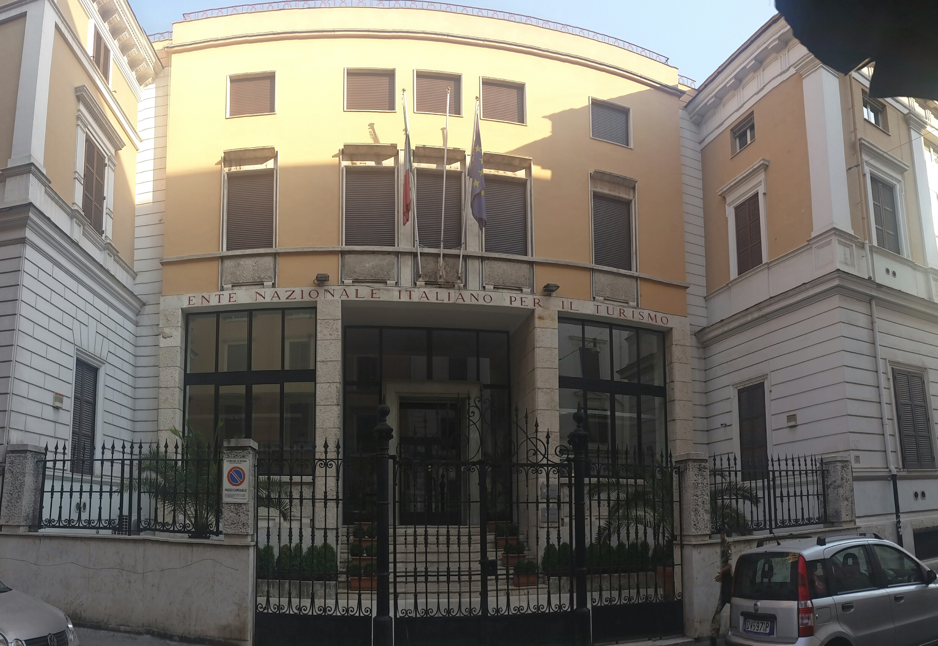 Sede ENIT a Roma